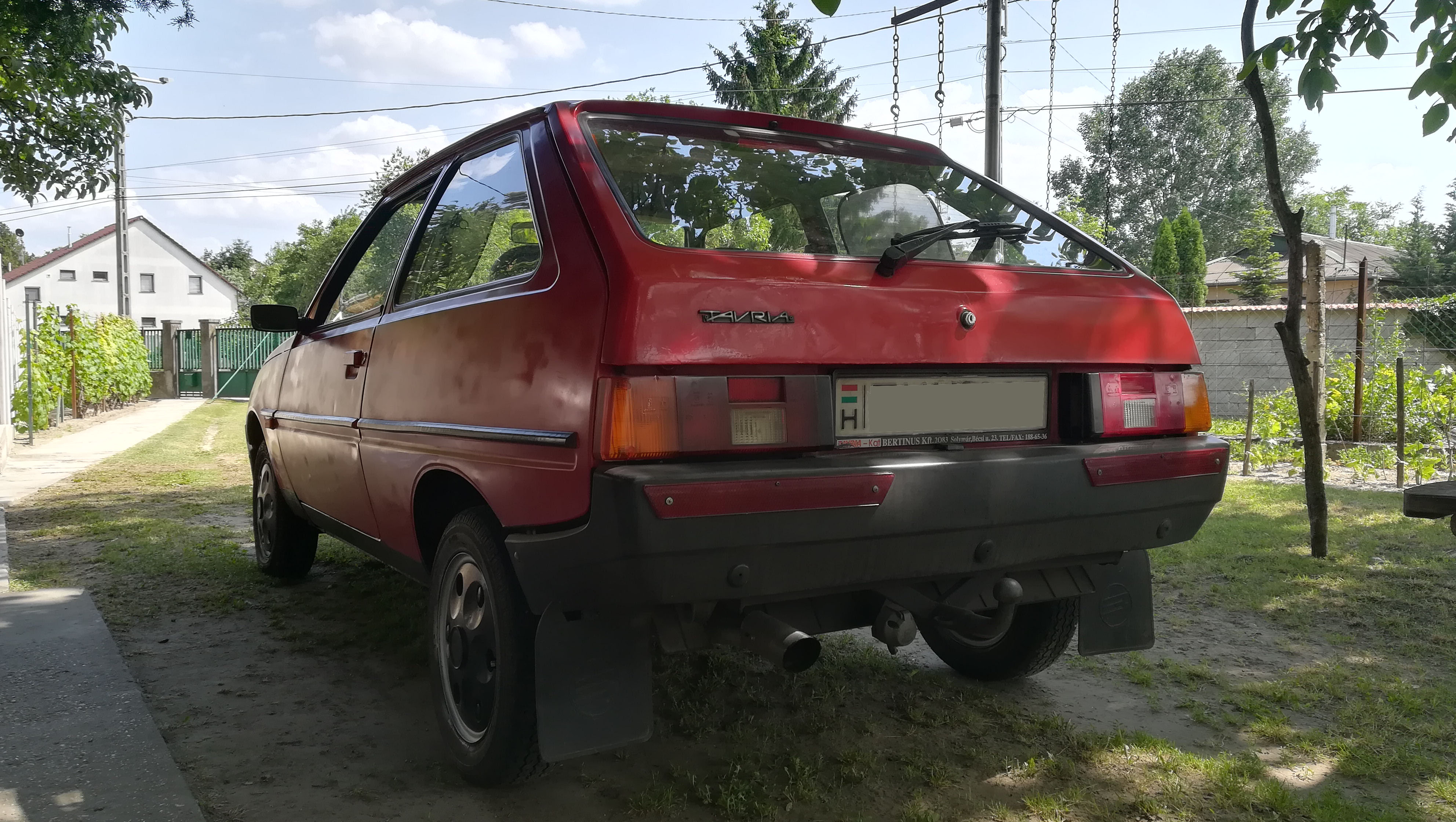 A legismertebb változat - ZAZ 1102 Tavria